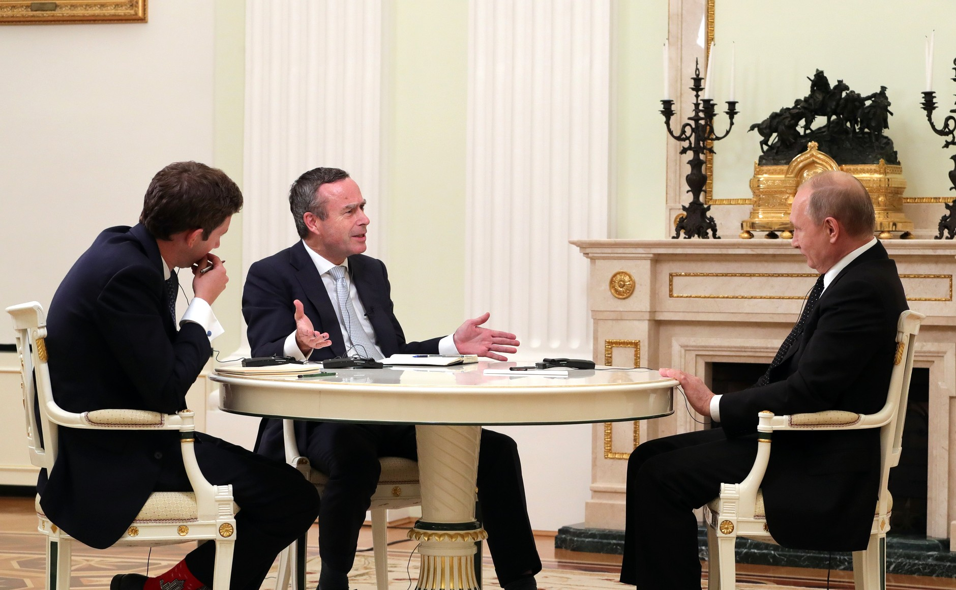 Интервью газете The Financial Times.